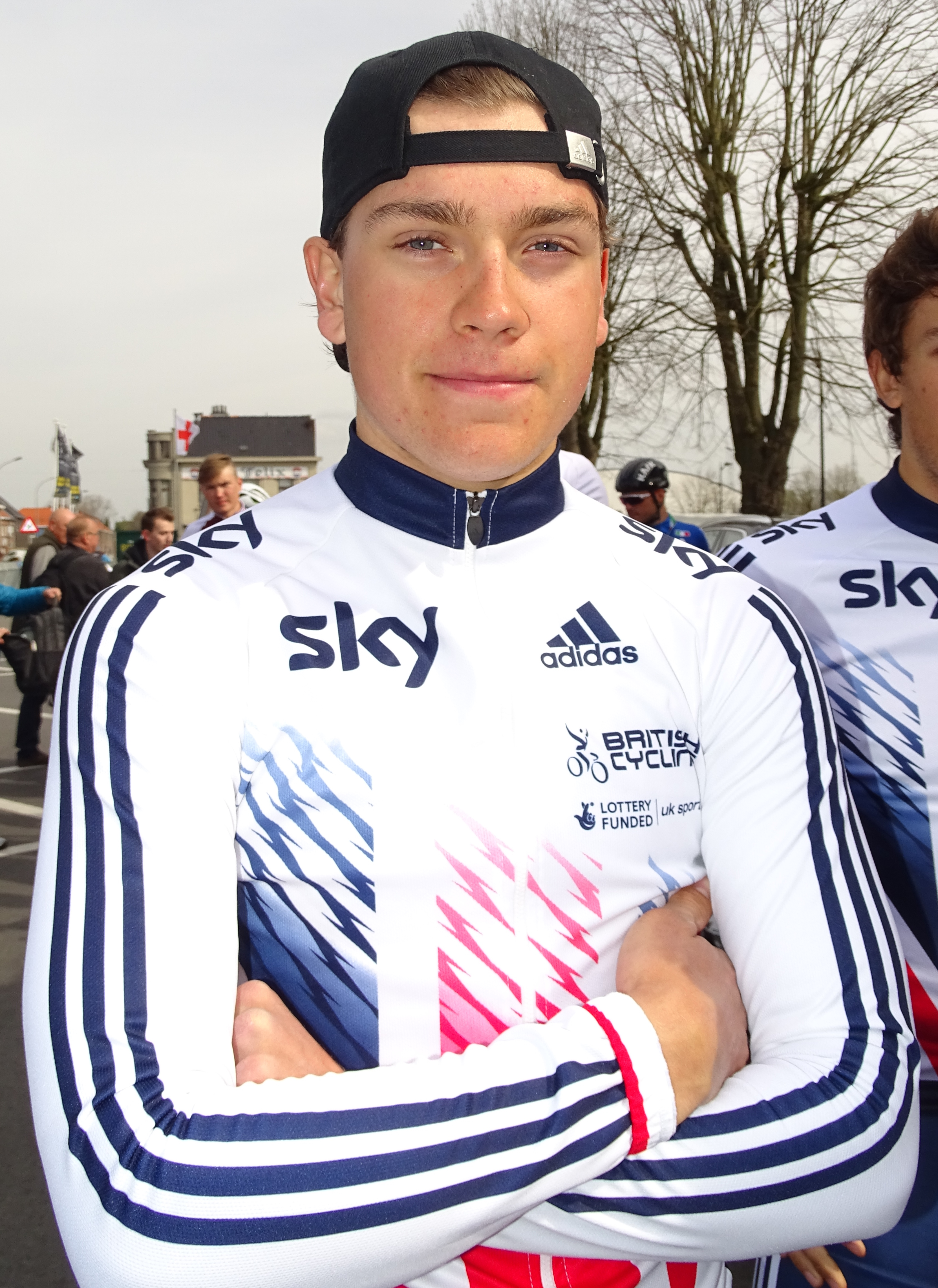 Reportage réalisé le samedi 9 avril à l'occasion du départ et de l'arrivée du Tour des Flandres espoirs 2016 à Audenarde, Belgique.